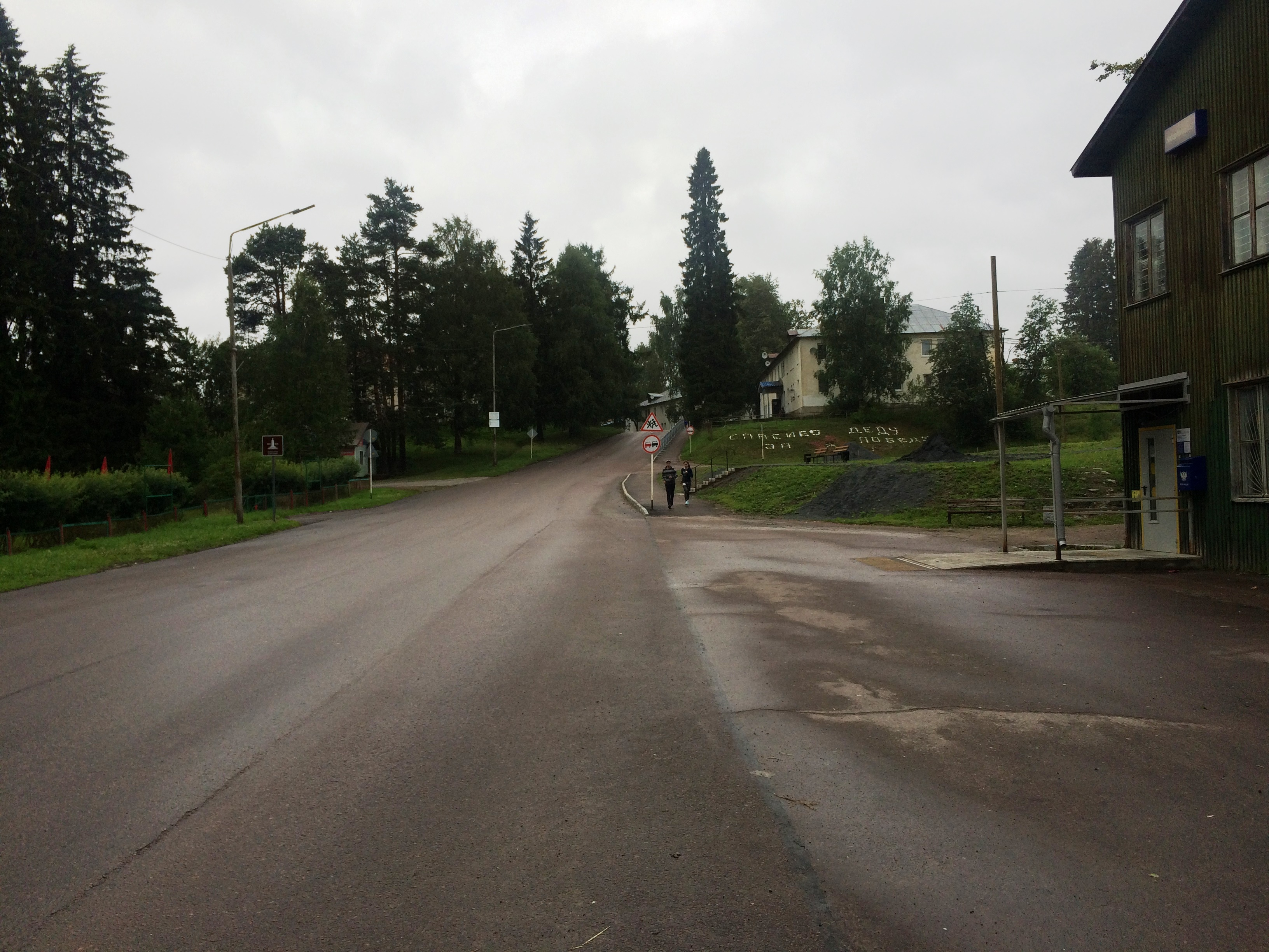 пгт Вяртсиля